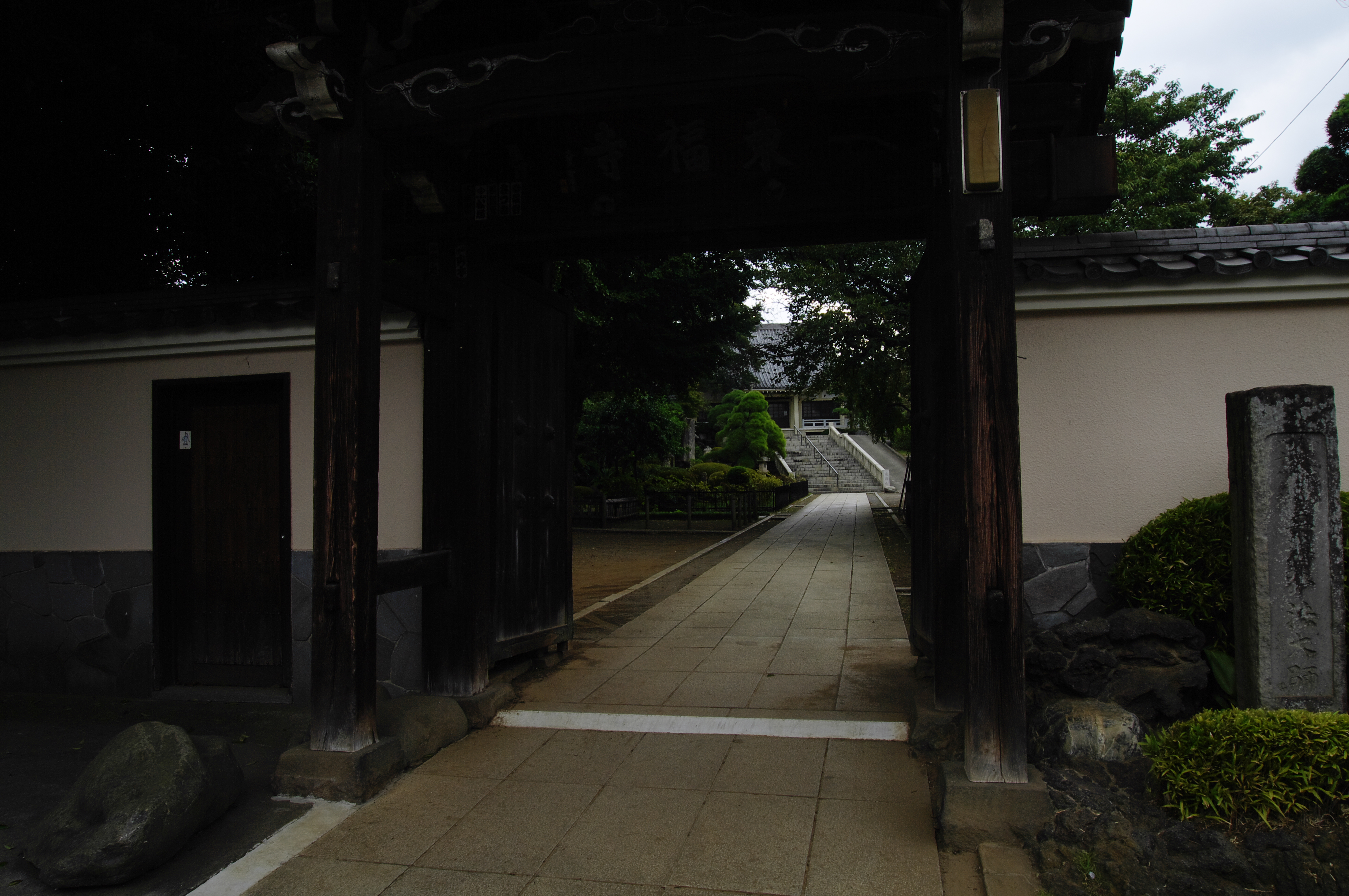 御府内八十八ヶ所 #2 東福寺